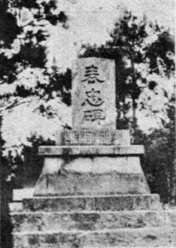 中文（台灣）: 為了紀念日方在隆恩埔戰役戰亡的人員，於1923年設立的紀念碑。